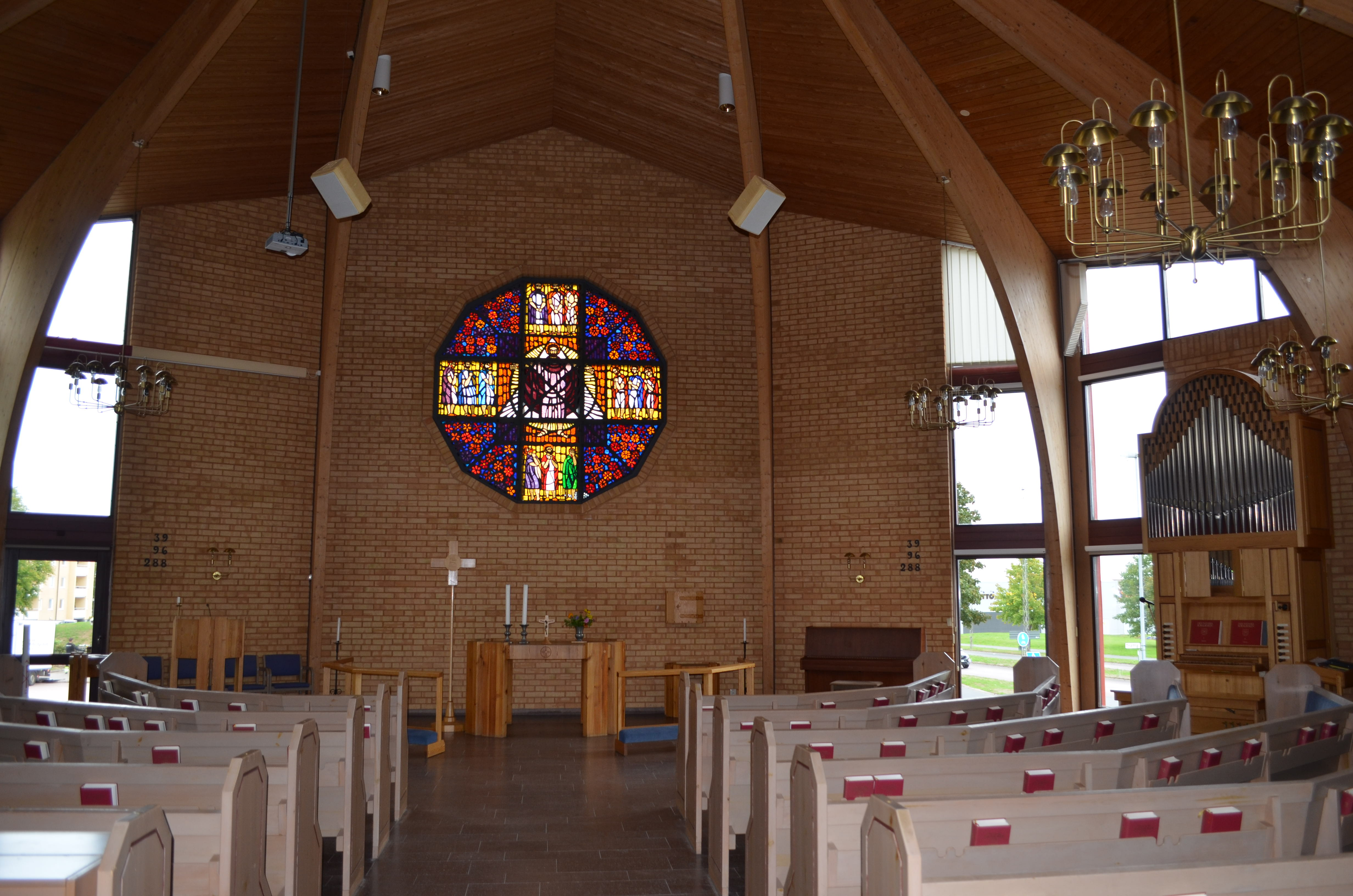 Kkyrkorumet.